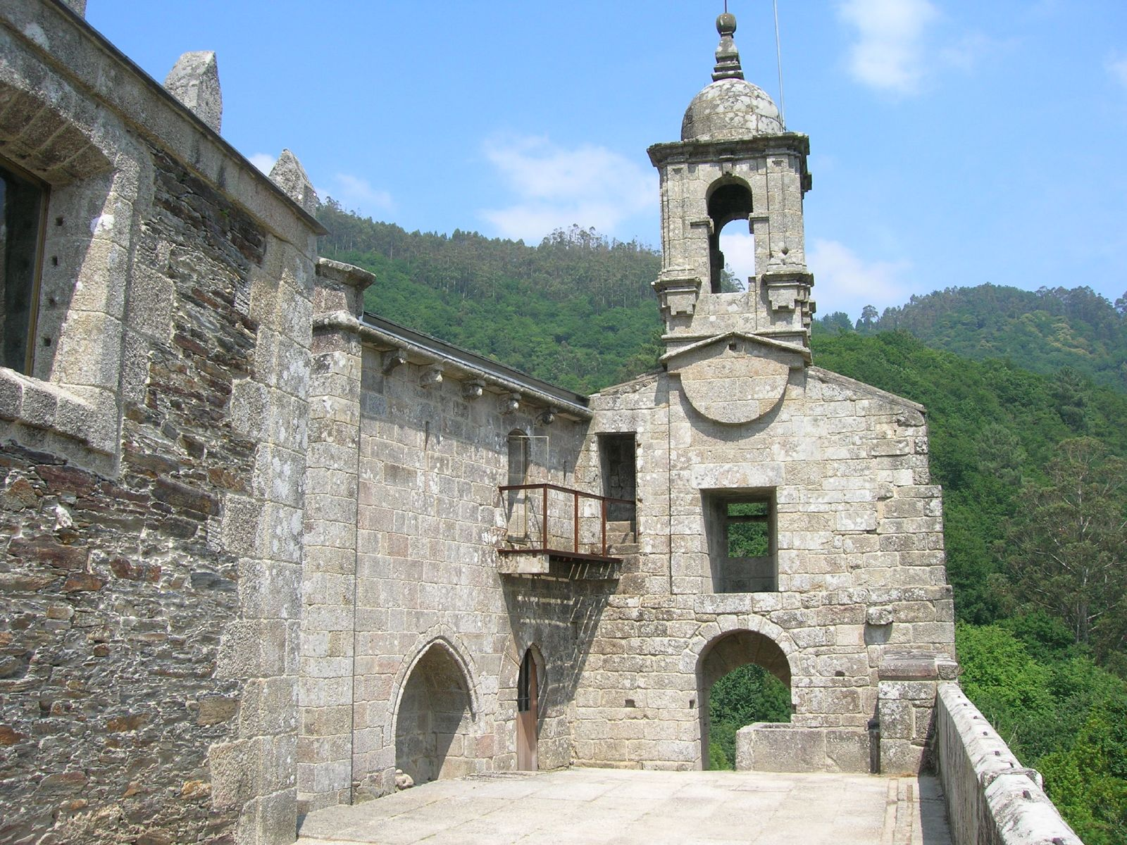 Mosteiro de San Xoán de Caaveiro (Parroquia:Capela (Santiago), concello da Capela, Comarca do Eume, Galicia - Spain'Monasterio de San Xoán de Caaveiro'